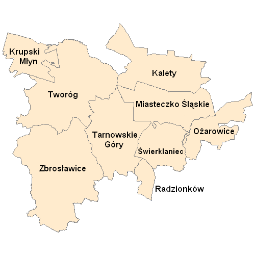 gminas in Tarnowskie Góry County